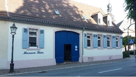 Strassenansicht des Museums Blau in Schwetzingen